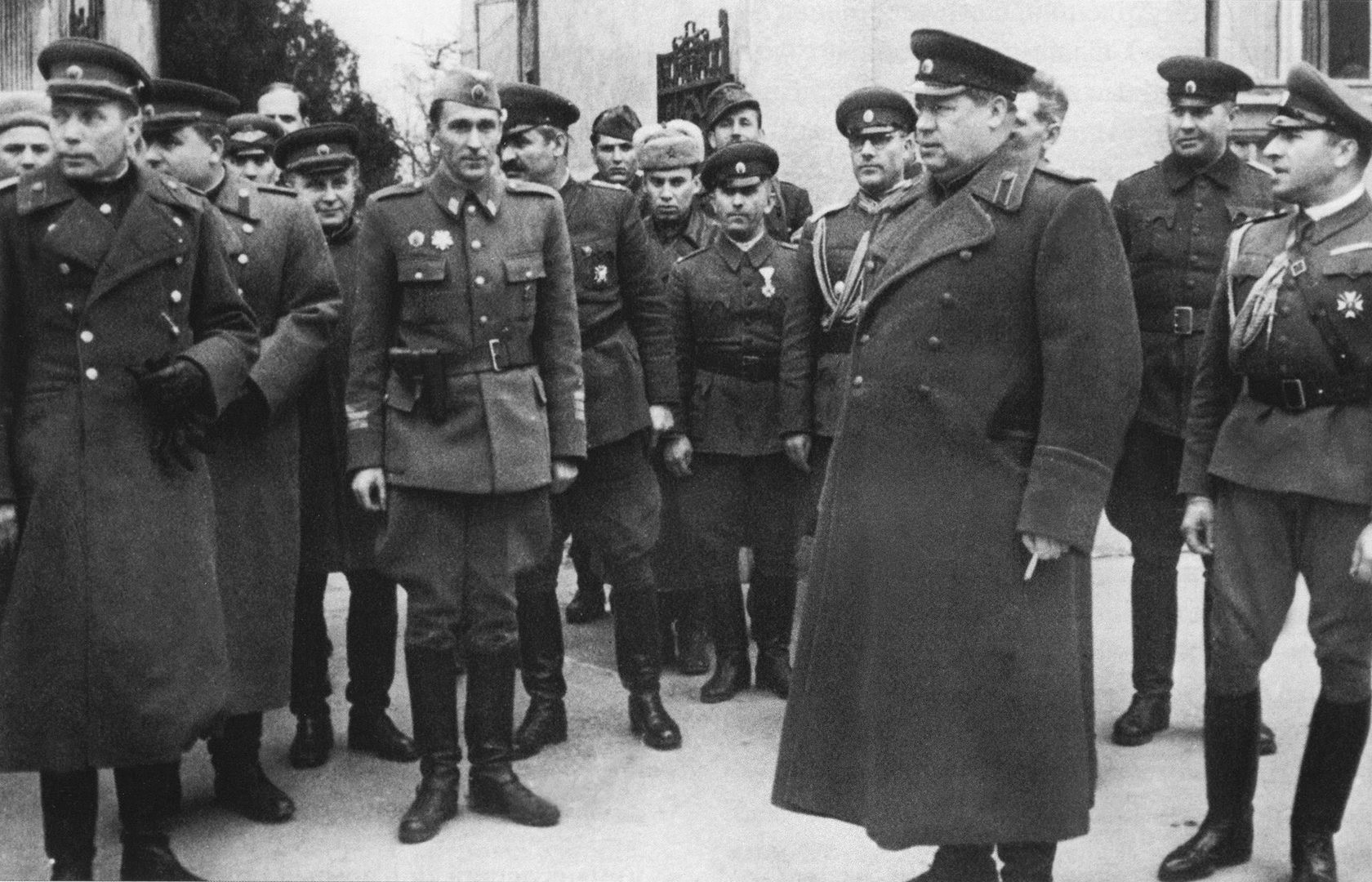 Маршал Советского Союза Ф.И. Толбухин инспектирует части 1-й болгарской армии. Позади Толбухина стоит командующий армией генерал-полковник Владимир Стойчев